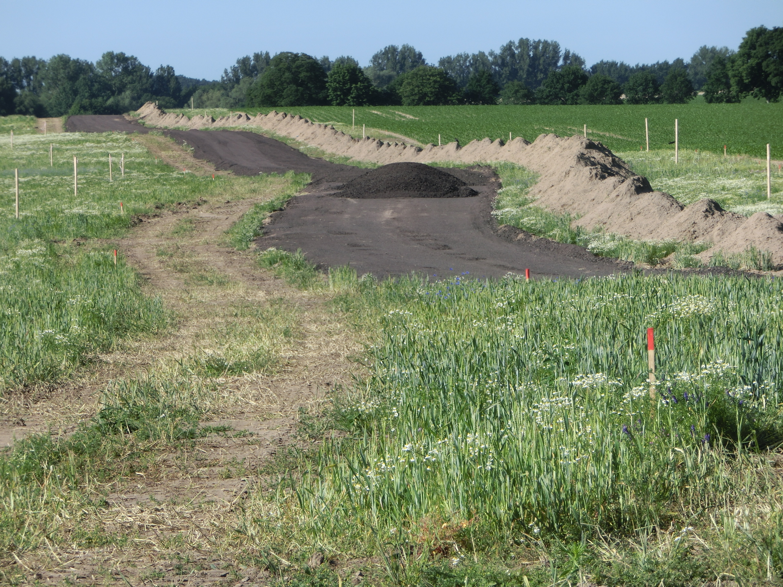 Baustraße für die nördliche Ortsumgehung von Plau am See